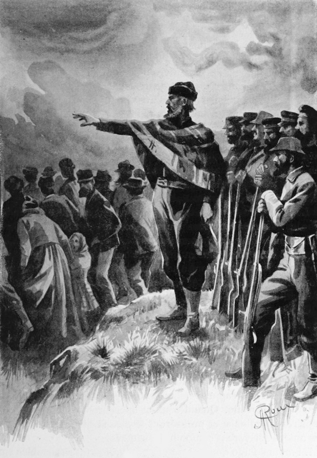 Illustration from Verne - Les Naufragés du Jonathan, Hetzel, 1909.djvu